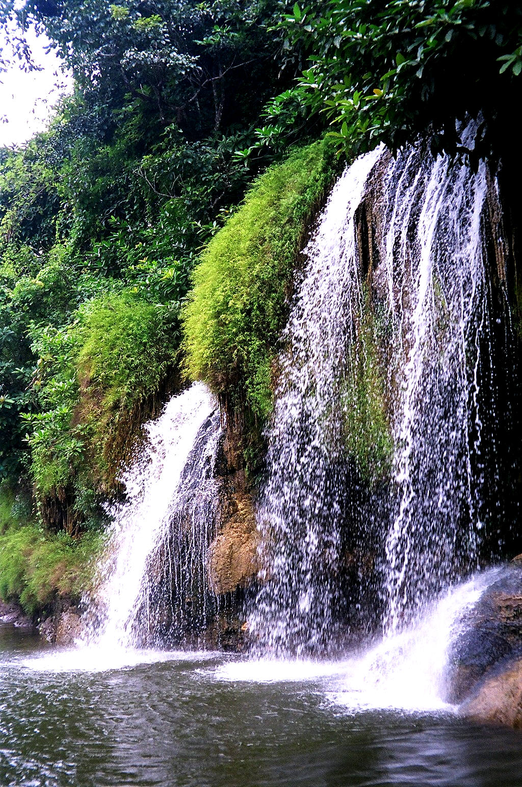 Sai Yok Yai Lek Waterfall in Sai Yok National Park, Kanchanaburi, Thailand